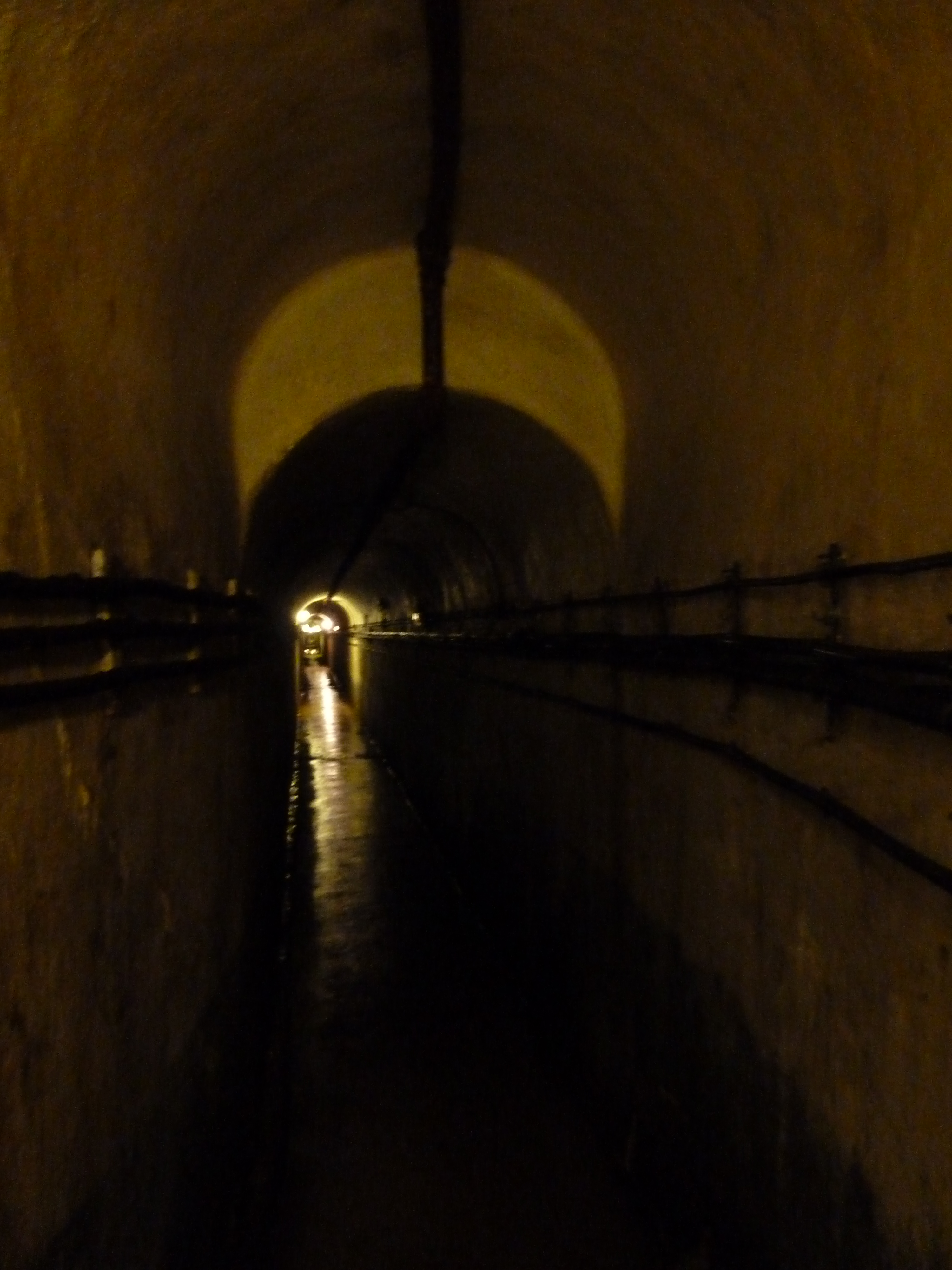 Tunnel reliant le Bloc1 au Bloc 2